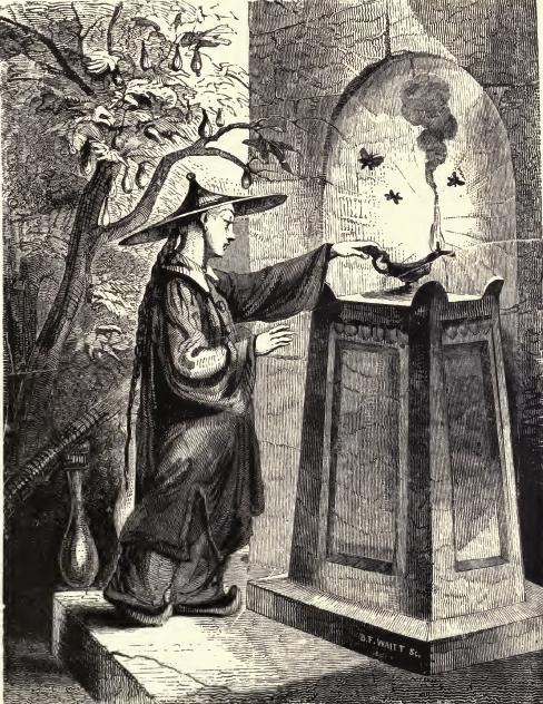 Book illustration